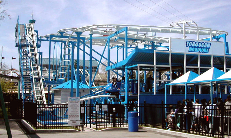 Le toboggn nordique